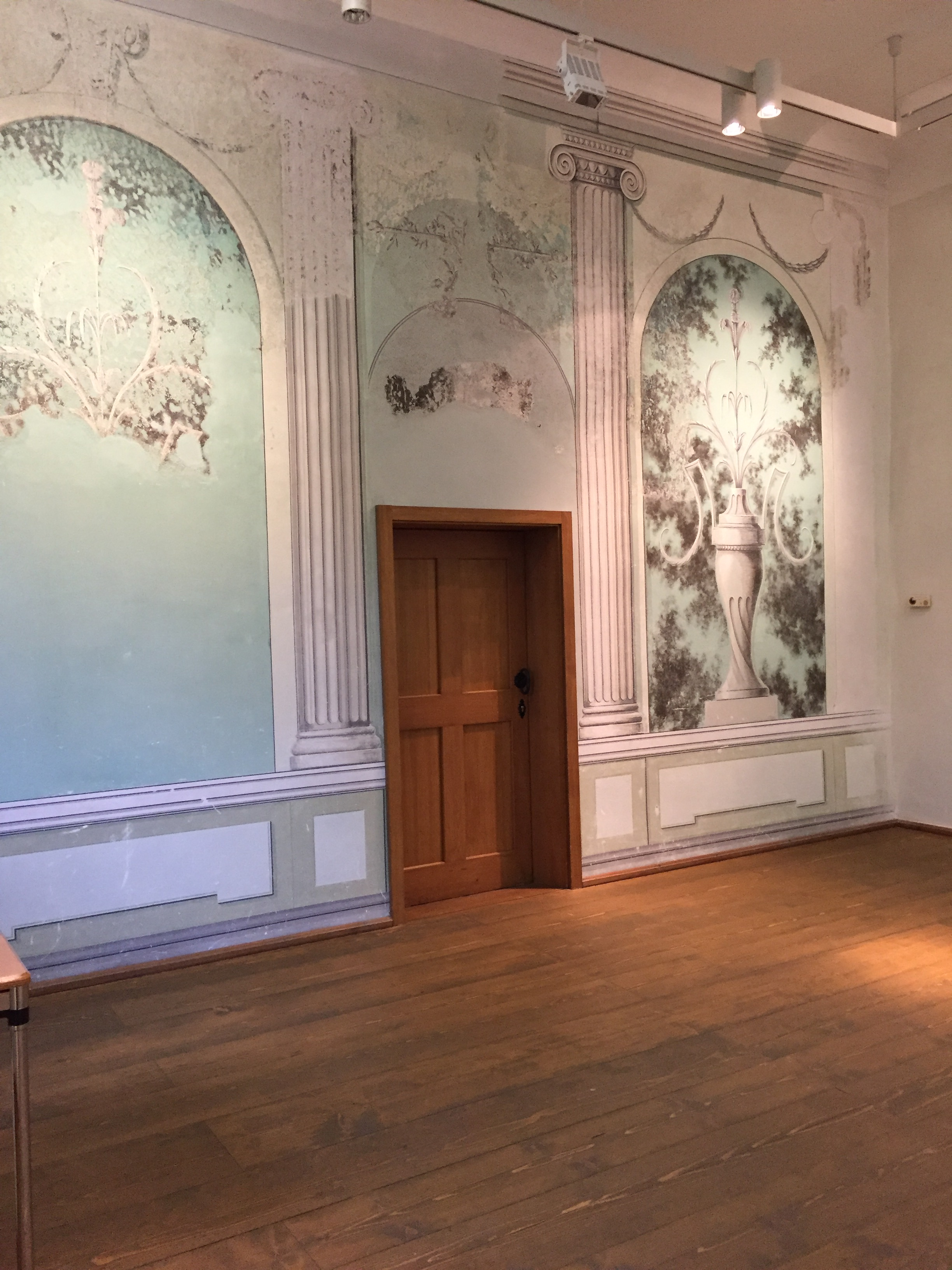 Der sogenannte Grüne Salon im Wasserschloß Klaffenbach, Chemnitz. Restaurierte Stirnwand.